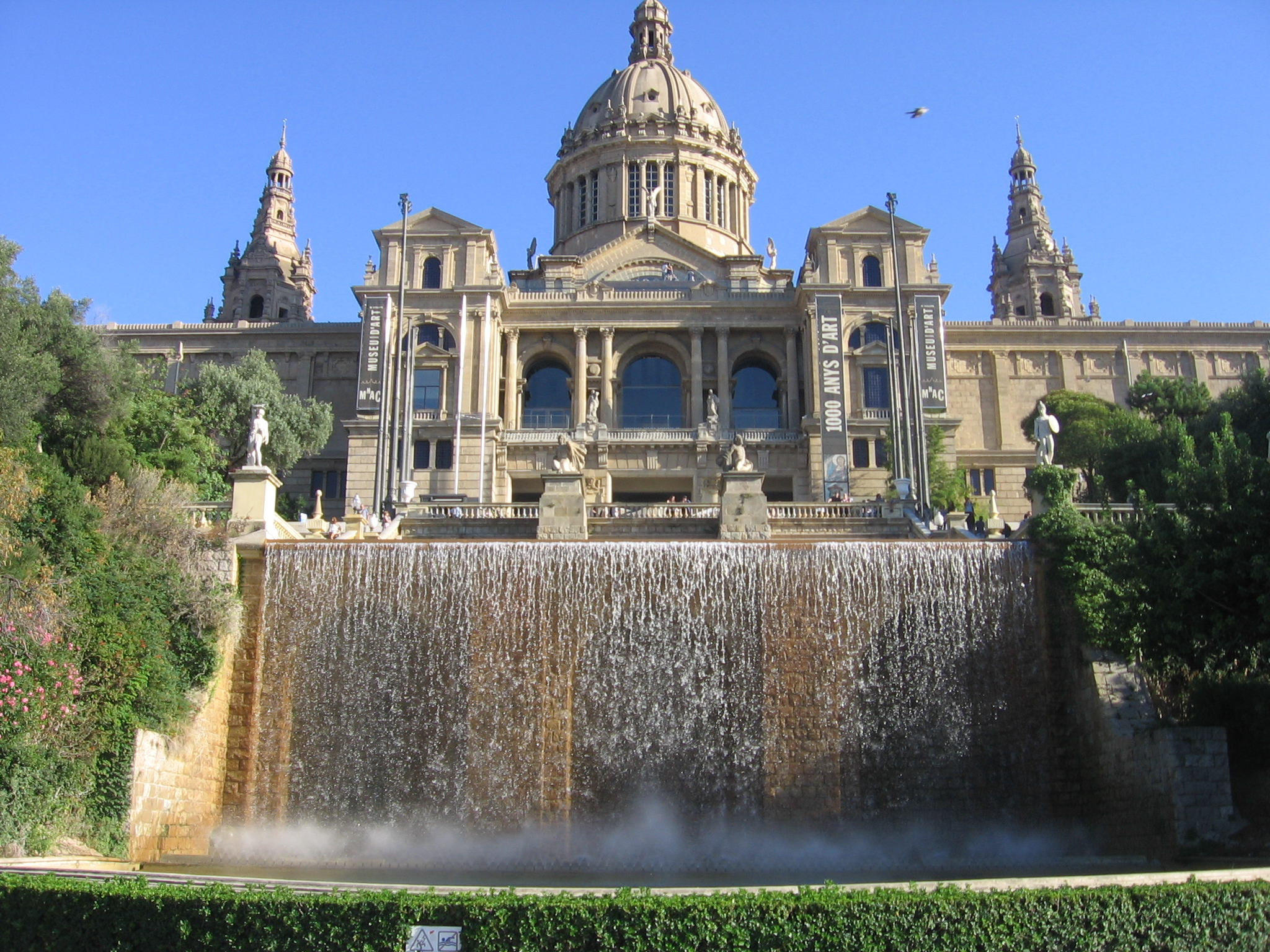 Palacio Nacional de Montjuïc.